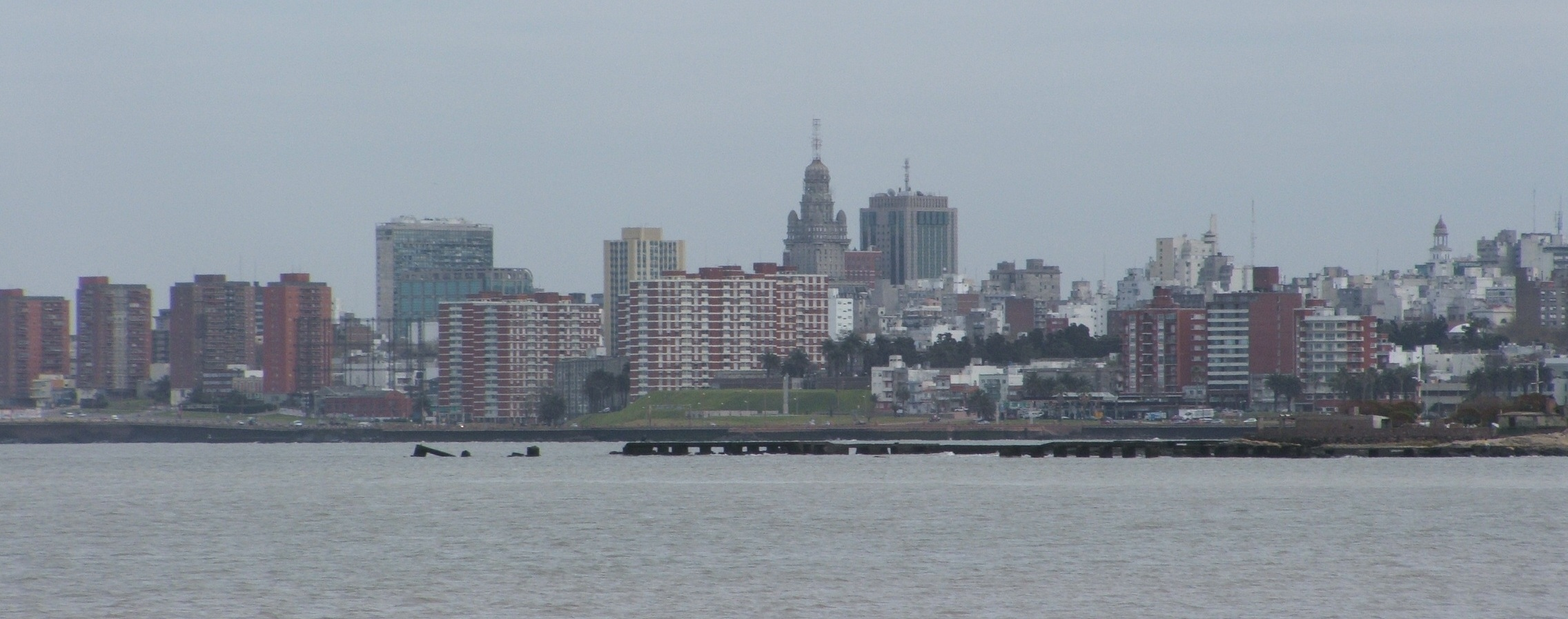 La Rambla Sur de Montevideo vista desde el Faro de Punta Carretas